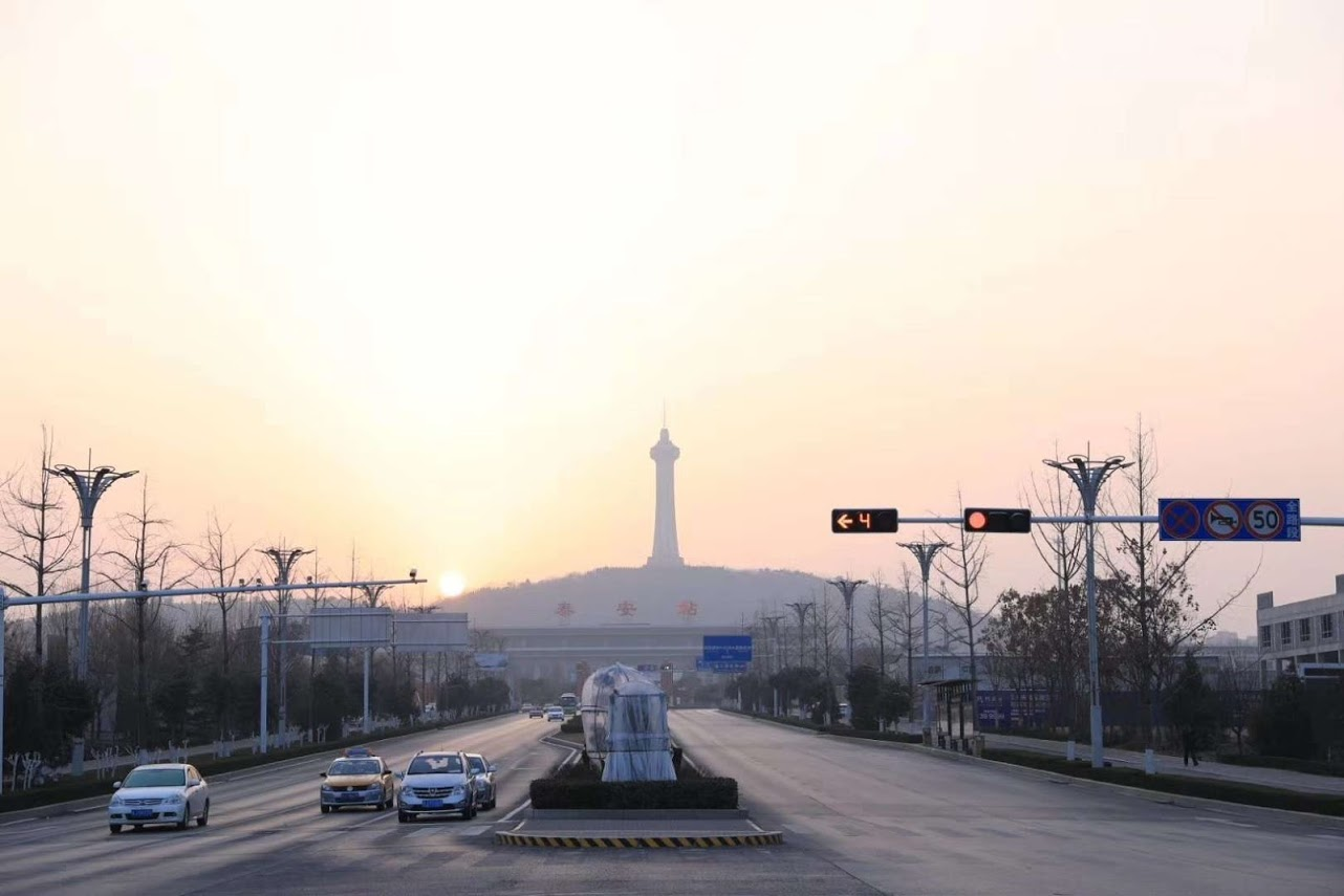 高铁泰安站前和万里纪念塔